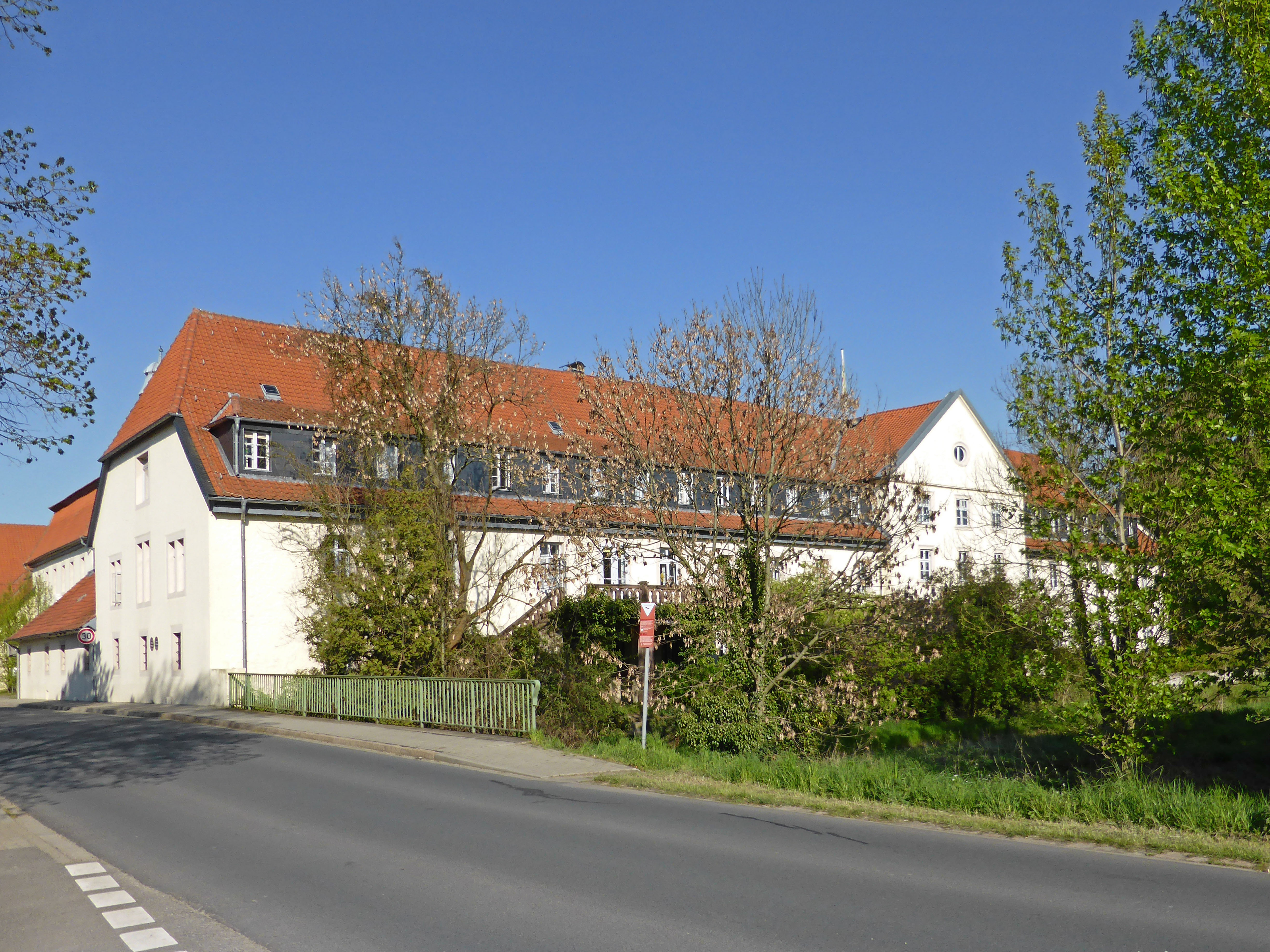 Schloss in Beienrode bei Königslutter.